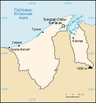 Карта БрунеяБеларуская (тарашкевіца): Мапа Брунея